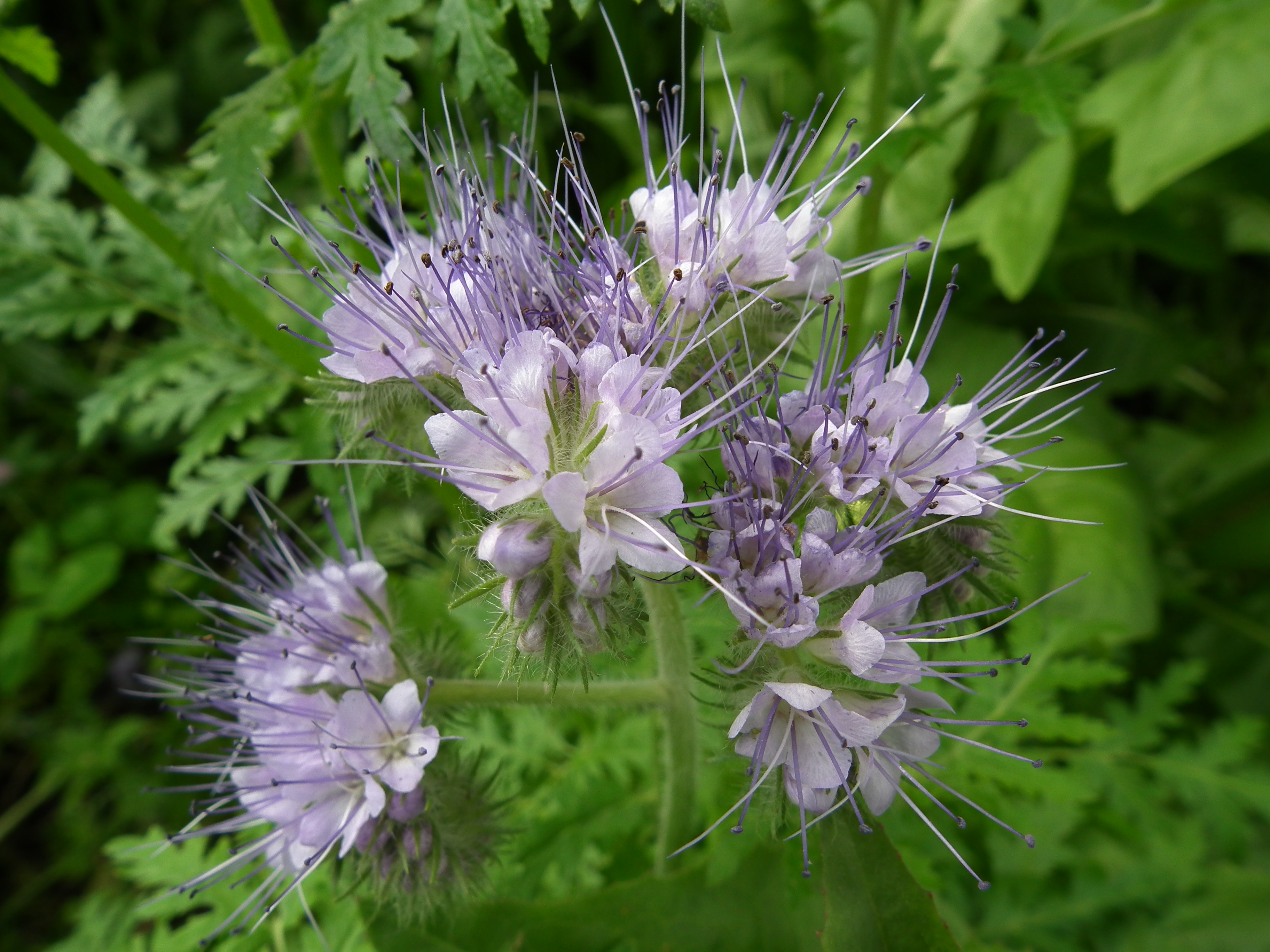 Rainfarn-Phazelie (Phacelia tanacetifolia), fotografiert in Heidelberg (Baden-Württemberg, Deutschland)